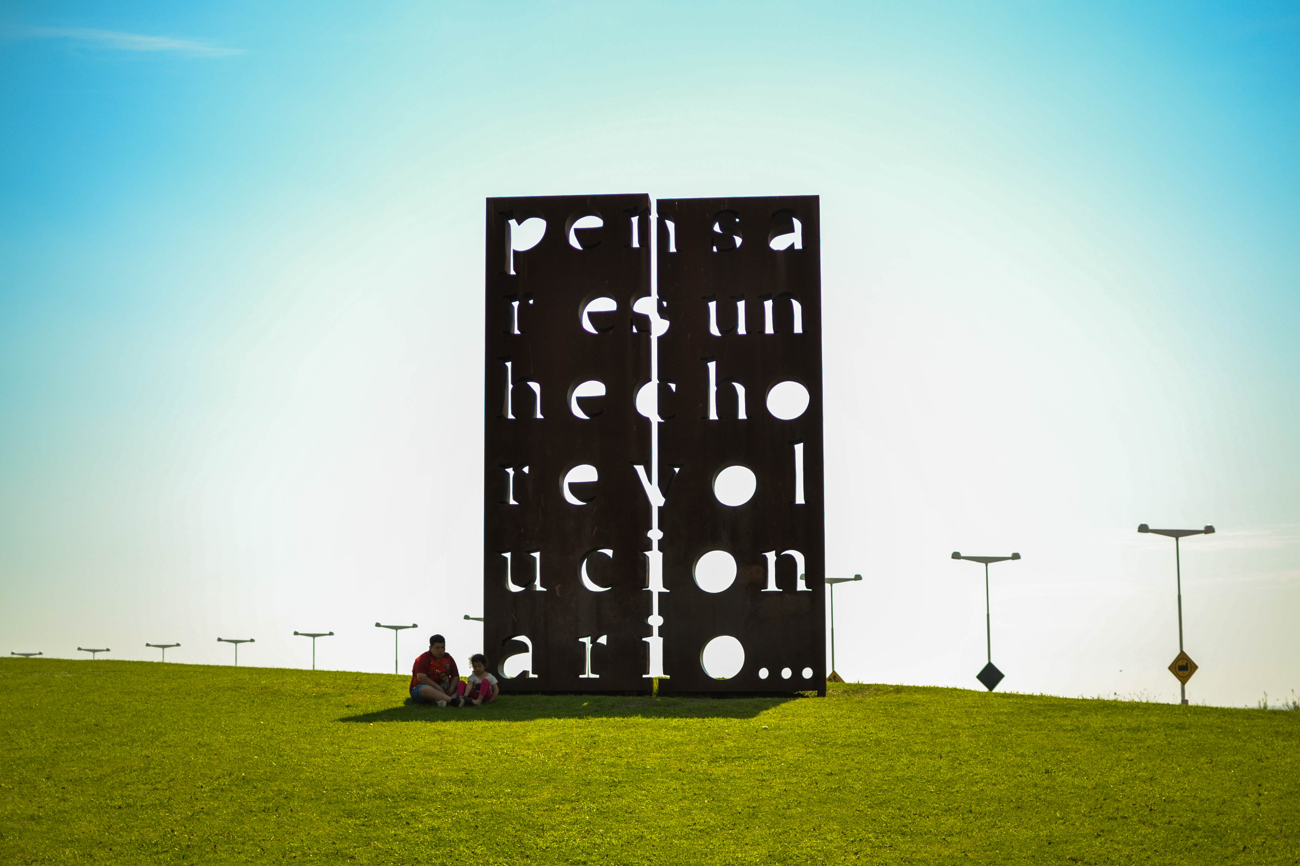 "Pensar es un hecho revolucionario" una obra de Marie Orensanz